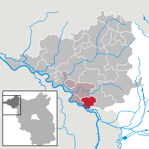 Legde/Quitzöbel in Brandenburg (Country) - District Prignitz